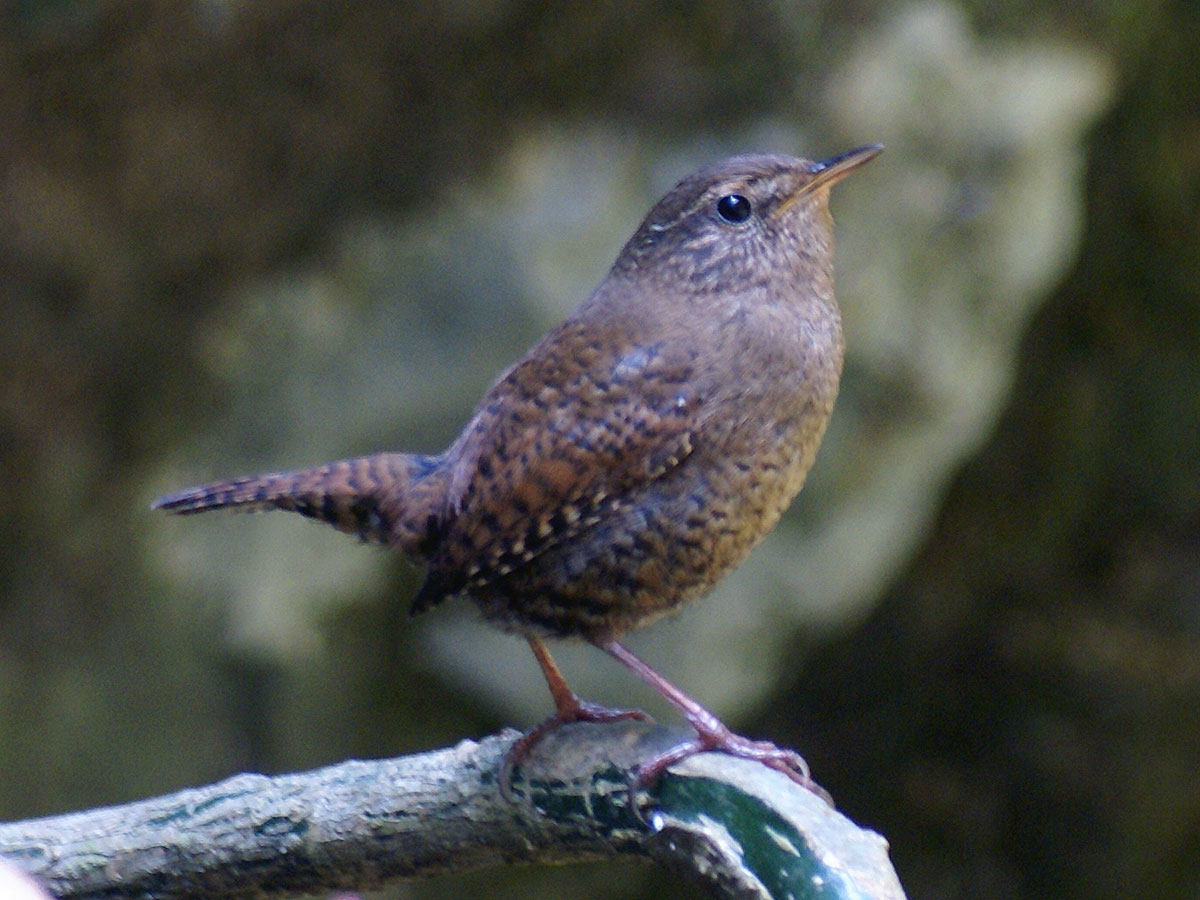 Troglodytes troglodytes